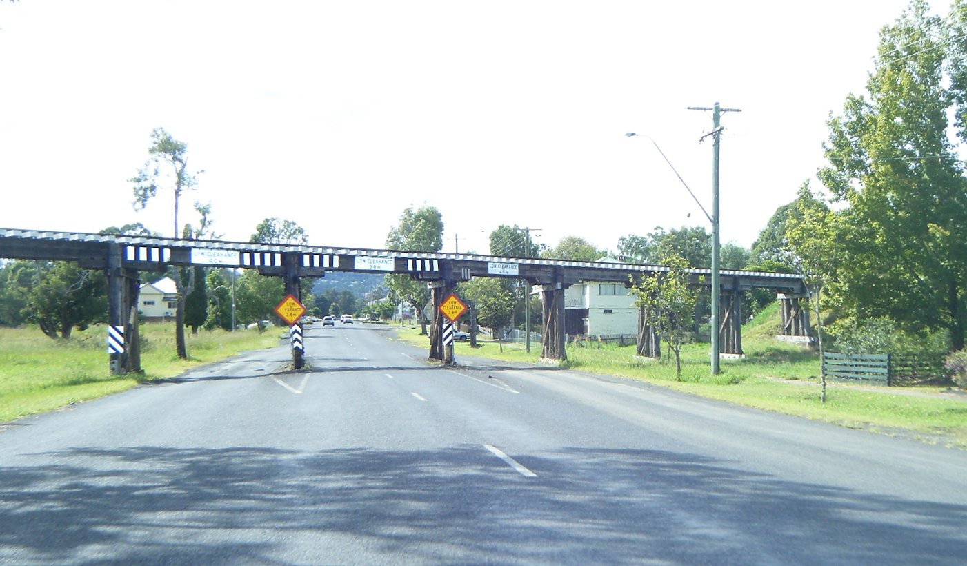 Lismore, NSW